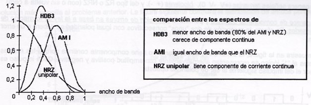 comparacion de espectros